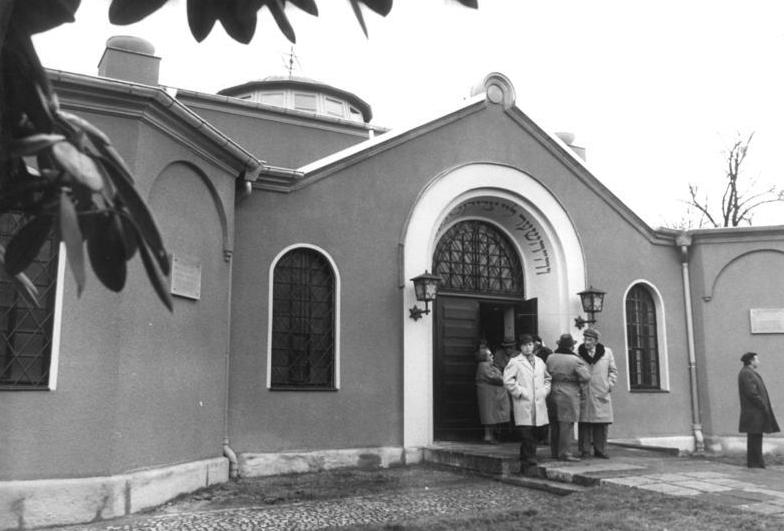 Dresden, Synagoge ADN-ZB Häßler 19.11.1985 Dresden: Synagoge in der Fiedler Straße.